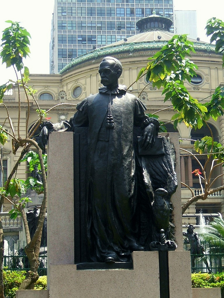 Monumento a Rui Barbosa, de José Cucê (1942). Na Praça Ramos de Azevedo, centro de São Paulo, Brasil